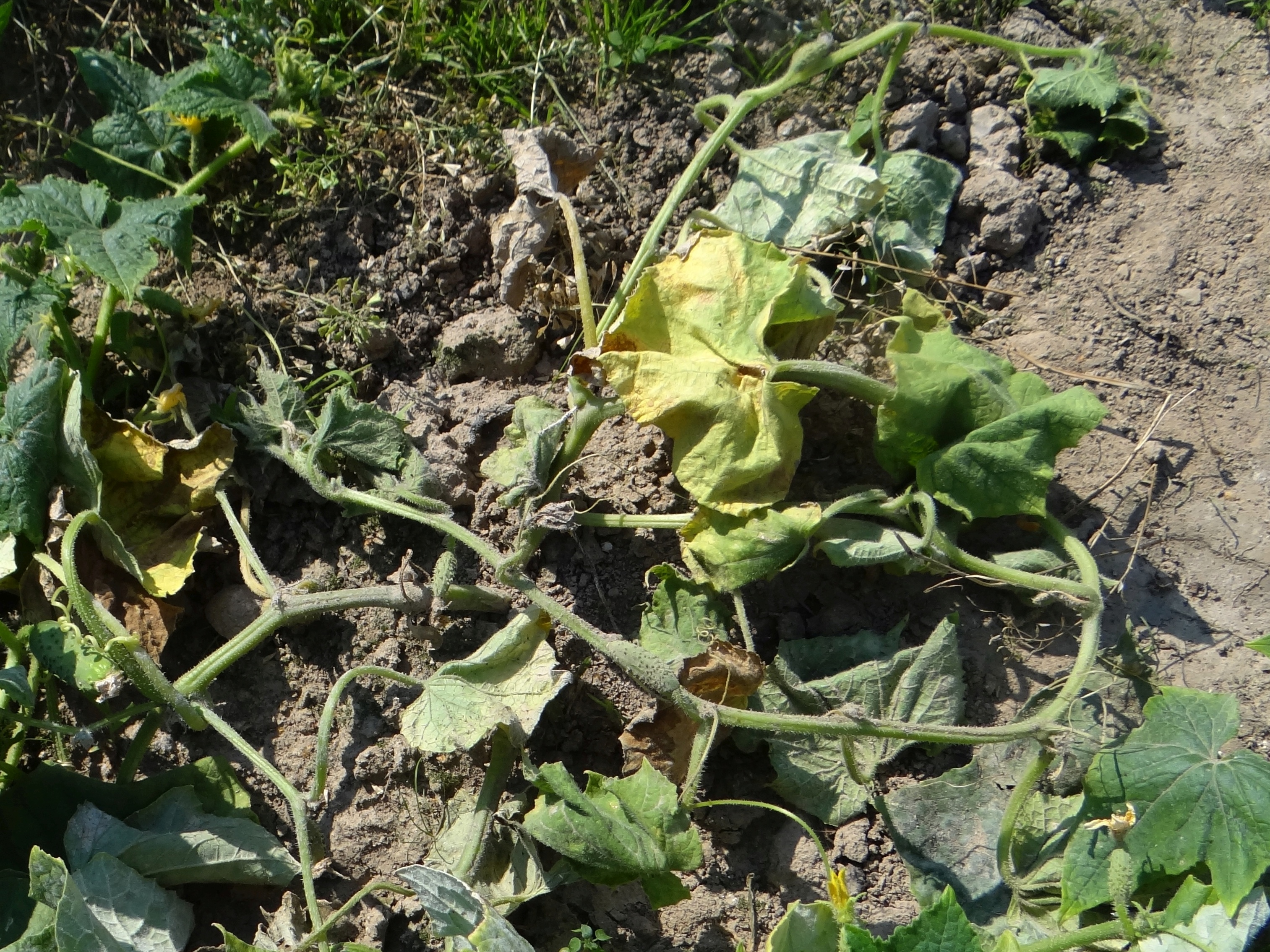 Fusariosis on Cucumis sativa